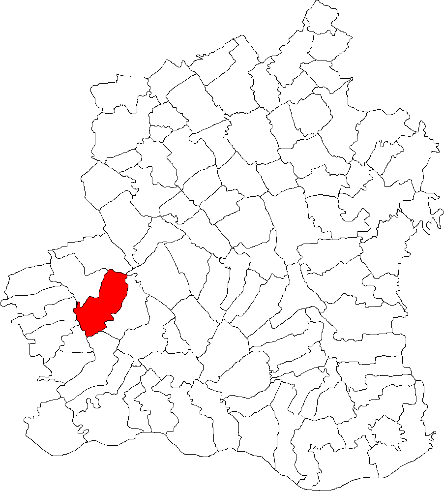 Categorie:Hărţi ale judeţului Teleorman